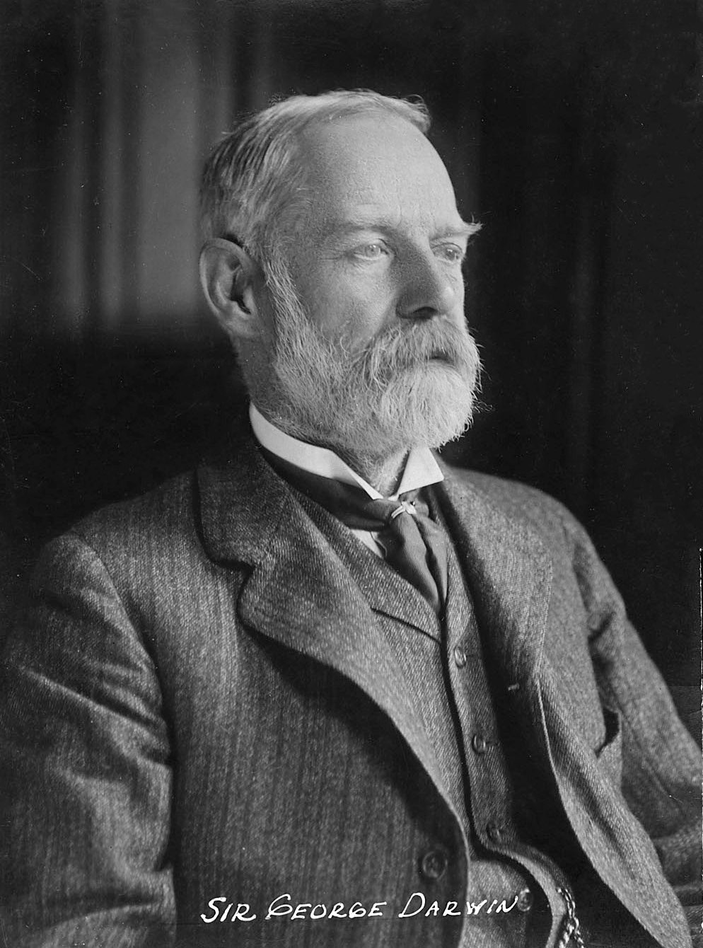 Darwin, George Howard (1845-1912)